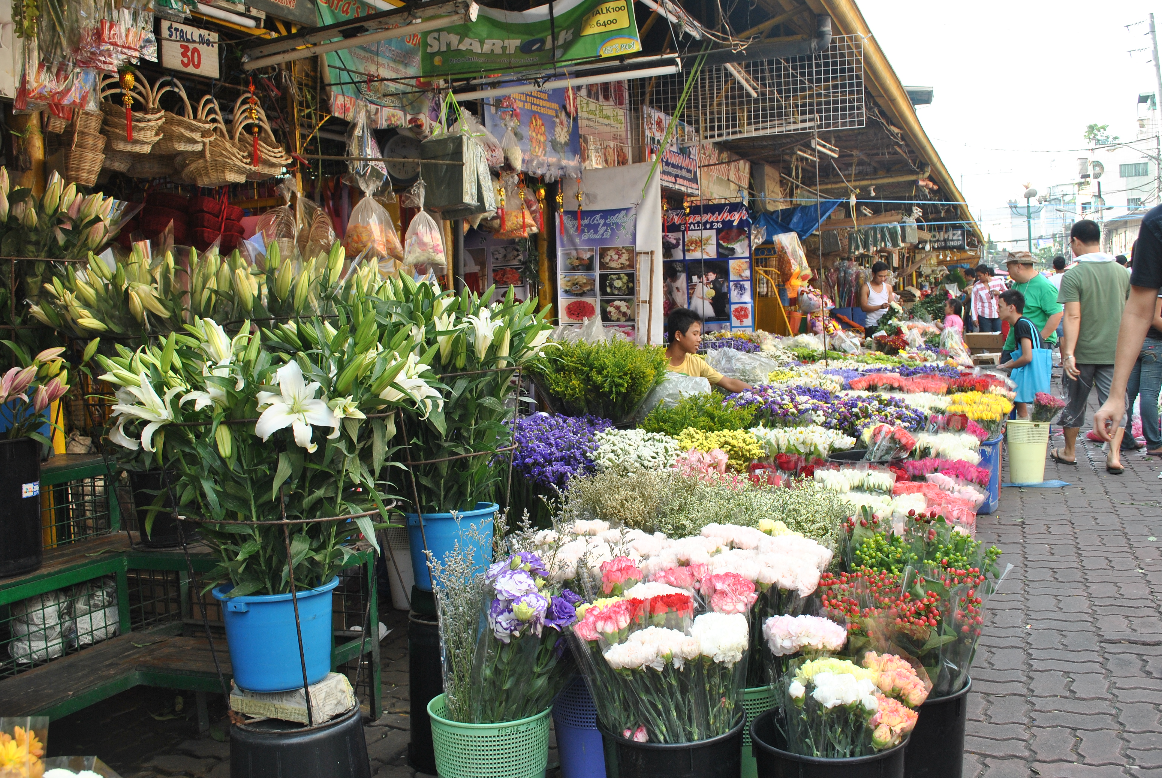 Dangwa flower market in Manila, Philippines